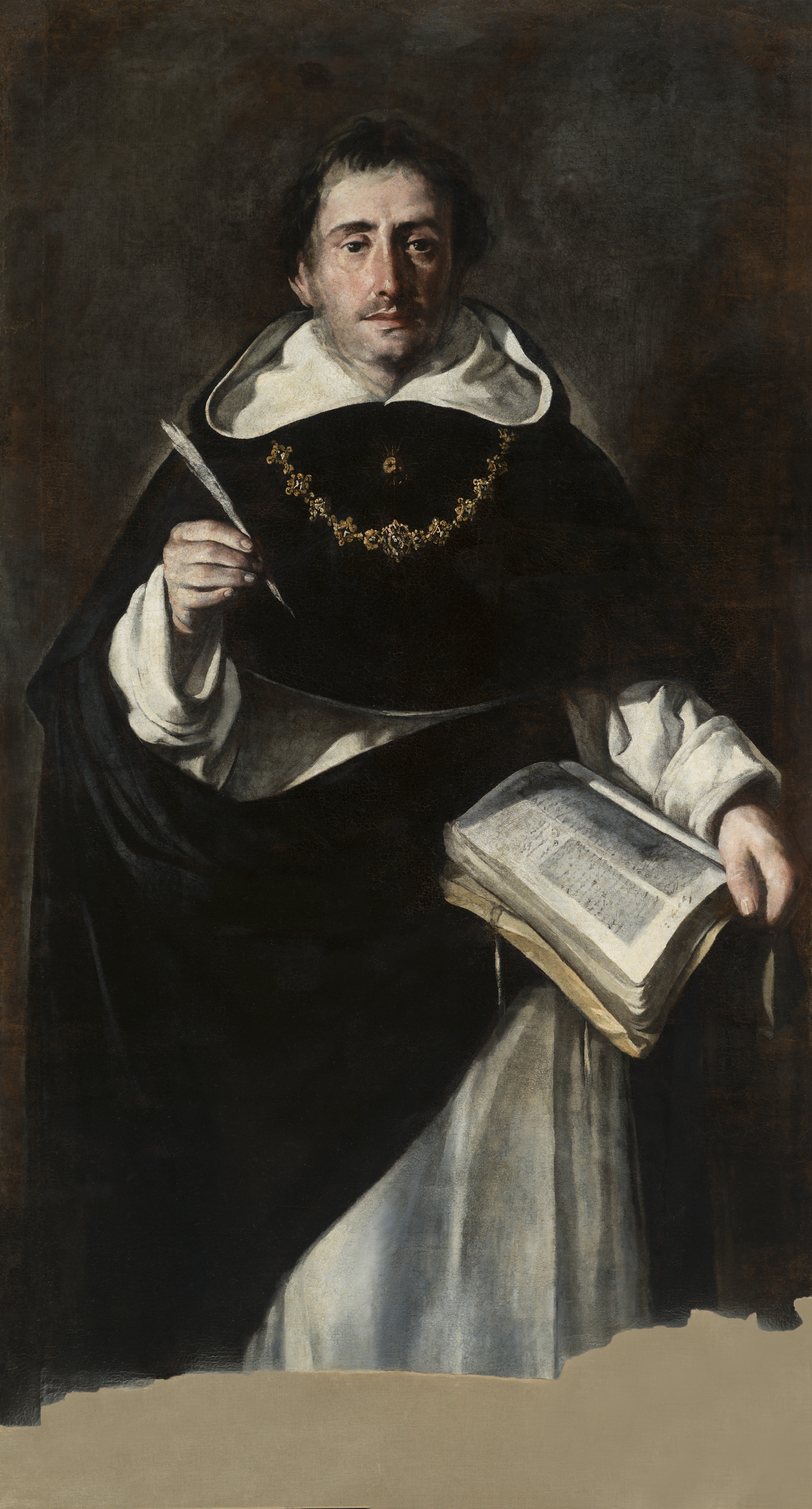 La obra representa al célebre teólogo dominico Santo Tomás de Aquino.